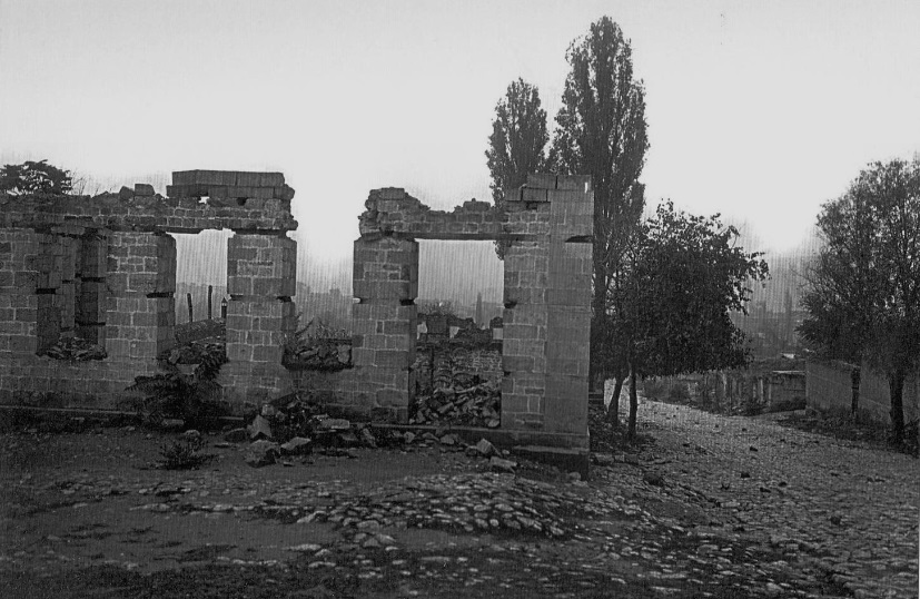 Qoşabulaq və Gürcübazar küçələrinin tinində yerləşən evlərin dağıntıları